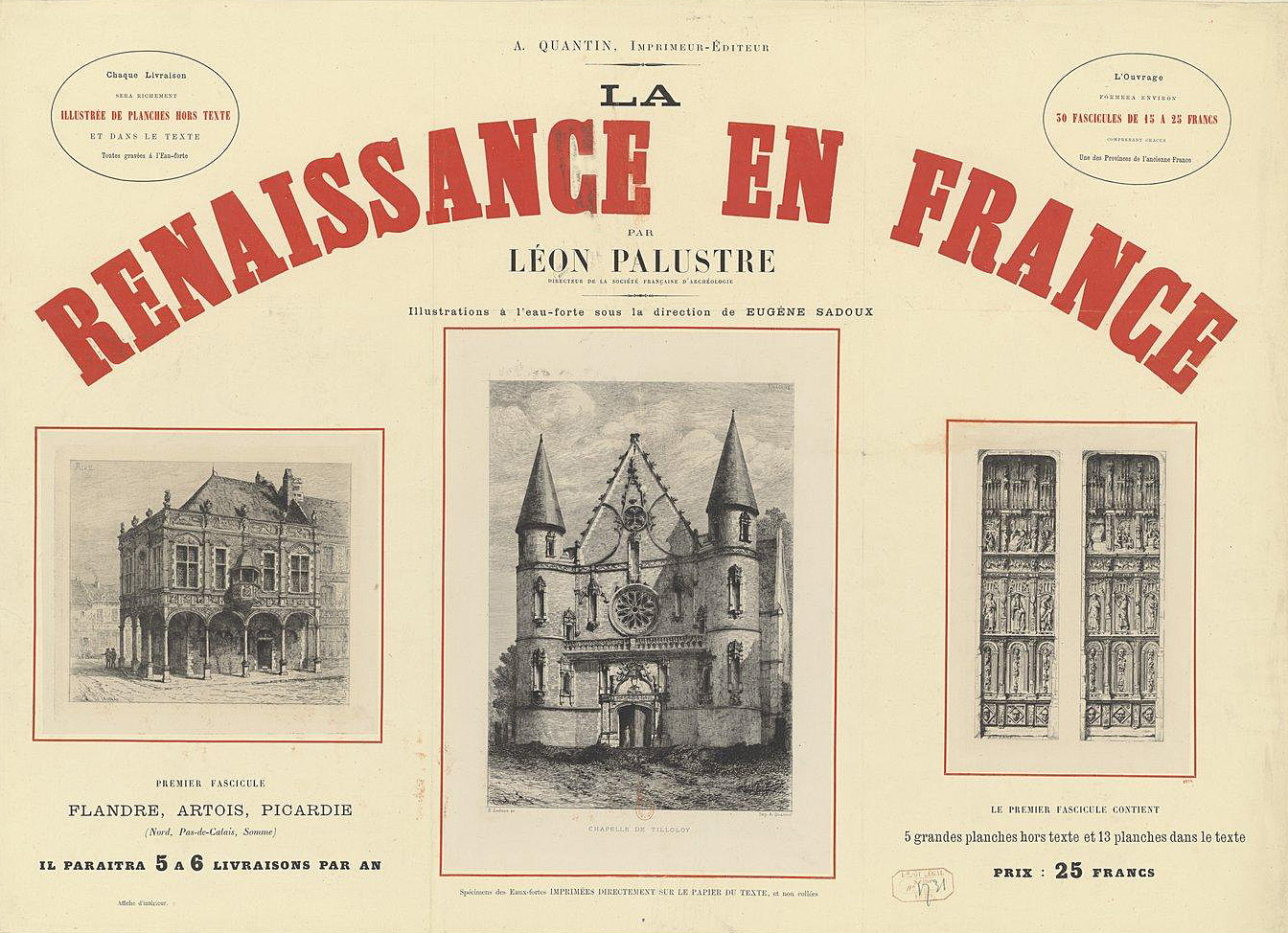 La Renaissance en France par Léon Palustre ..., illustrations à l'eau-forte sous la direction de Eugène Sadoux